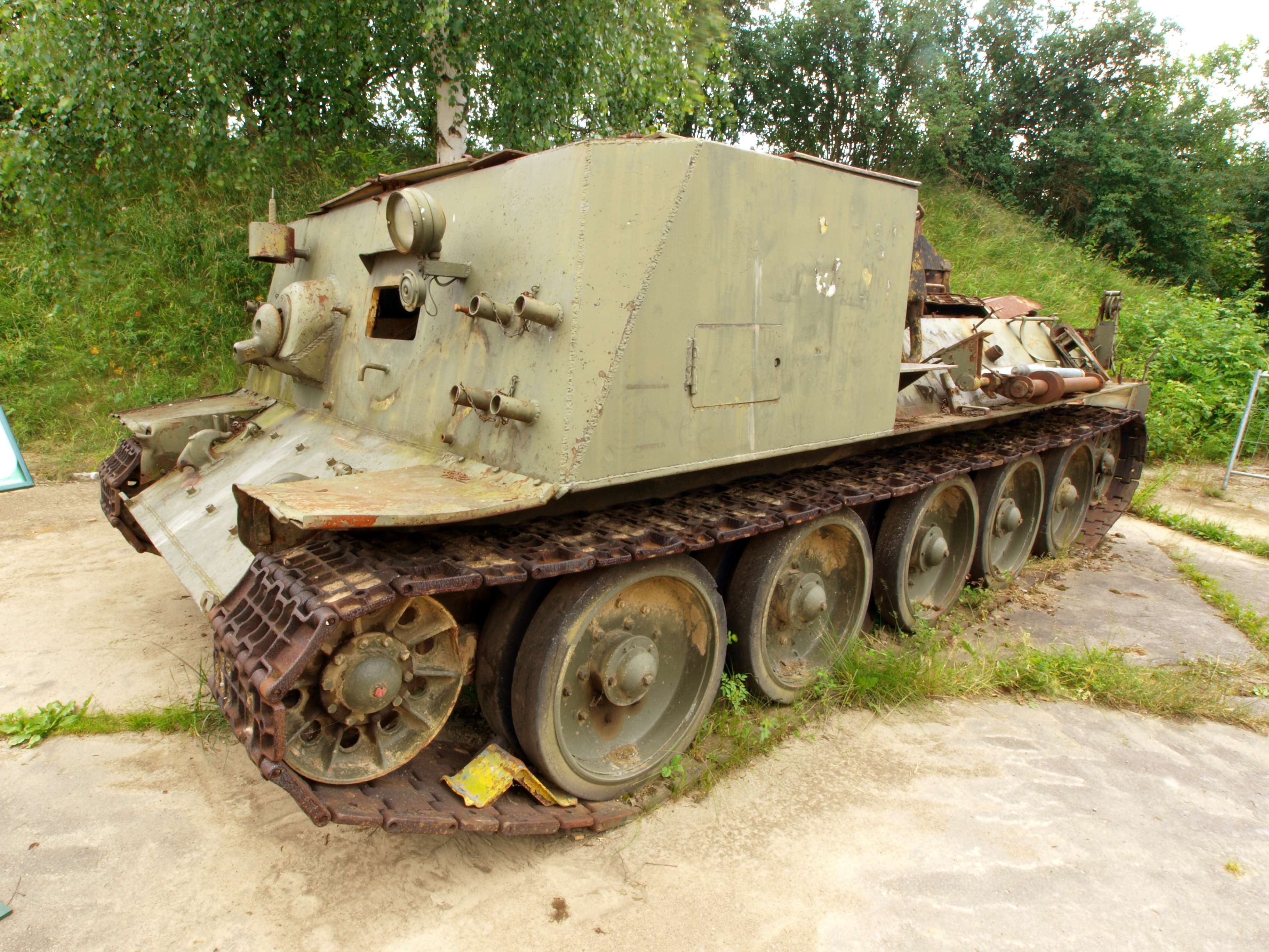 Czechoslovak recovery tank VT-34.